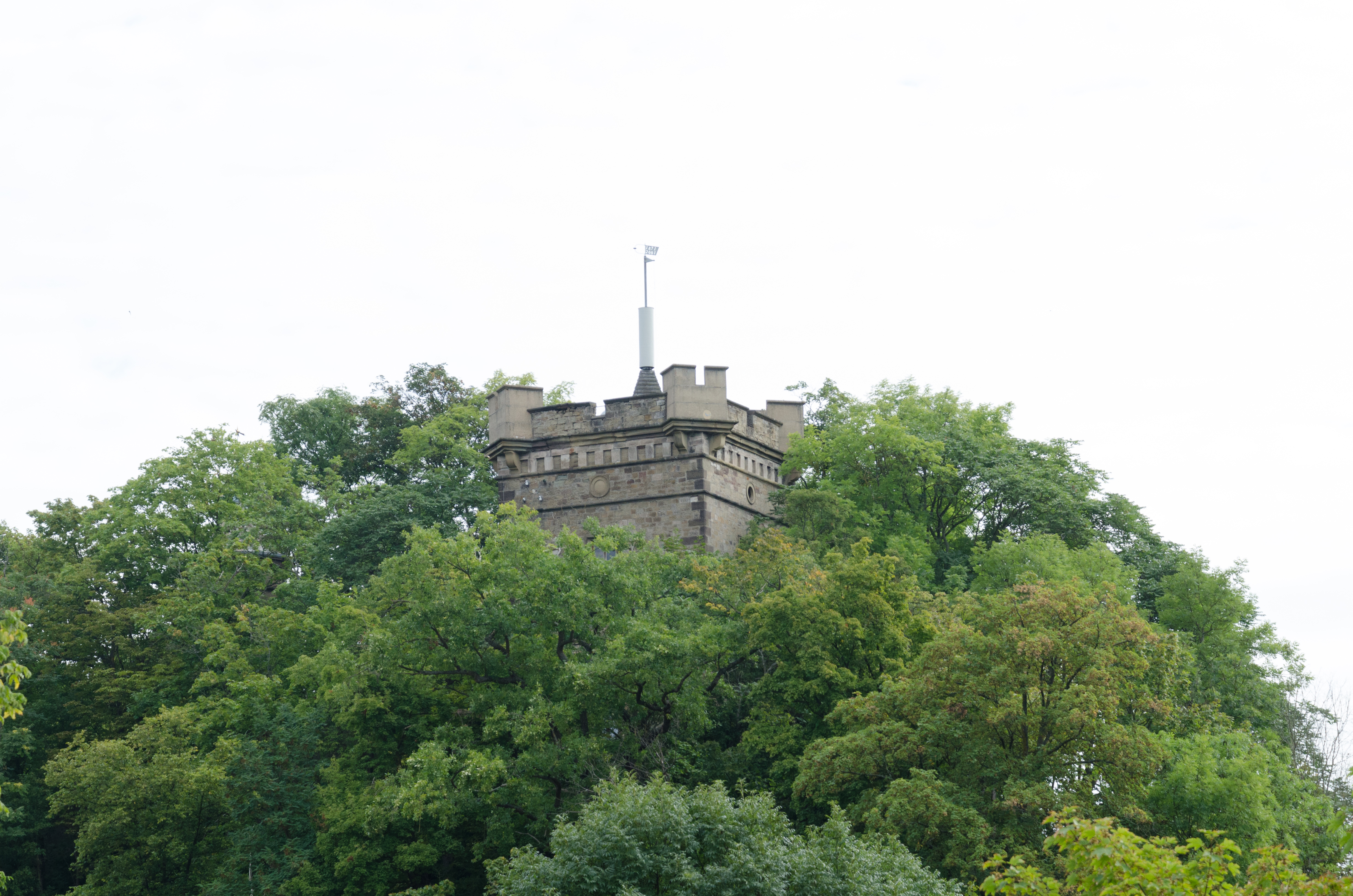 Schweinfurt, Peterstirn